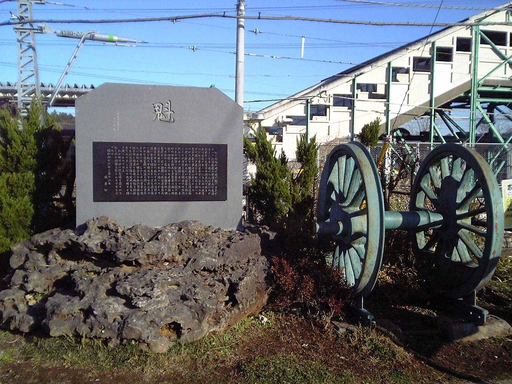 千葉県初の鉄道開設運動とその誘致に生涯を捧げた安井理民の功績をたたえた「魁の碑」（成東駅前）